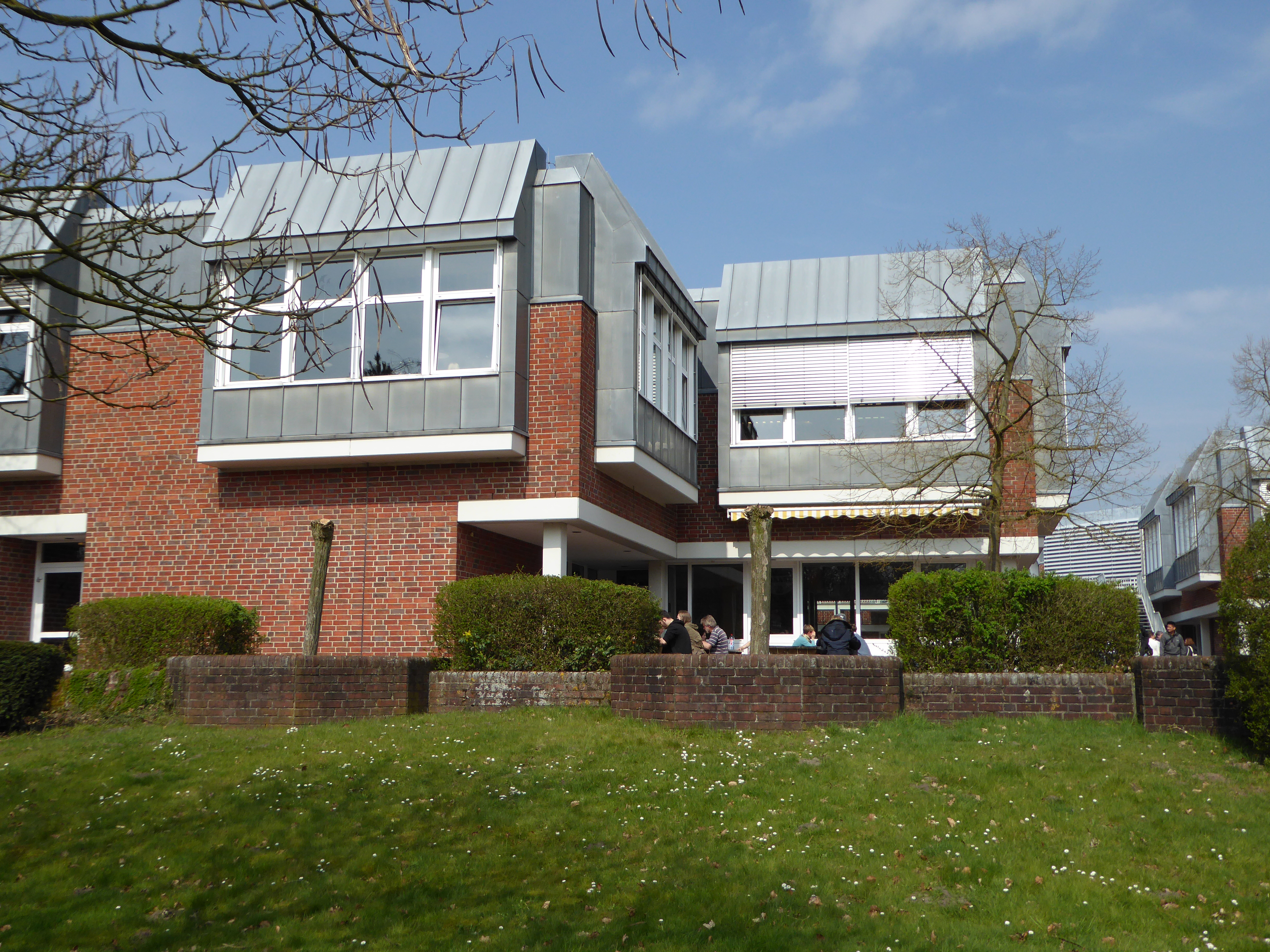 Gebäude M, beherbergt Mensa und Bistro.